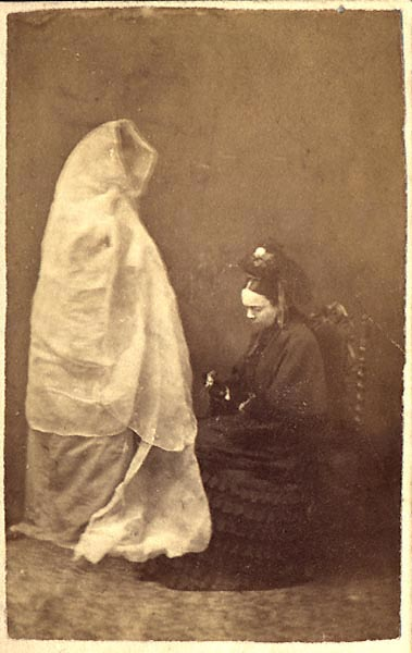 Frederick Augustus Hudson (B. CA. 1812) was a British spirit photographer who was active in the 1870s. Lady Helena Newenham and the Spirit of Her Daughter. Albumen carte de visite, 2.25 x 4 inches. June 4, 1872. Hudson had a studio at 177 Holloway Road, London. He is credited with producing the first spirit photograph made in Britain on March 4, 1872, just three months before this image was made.